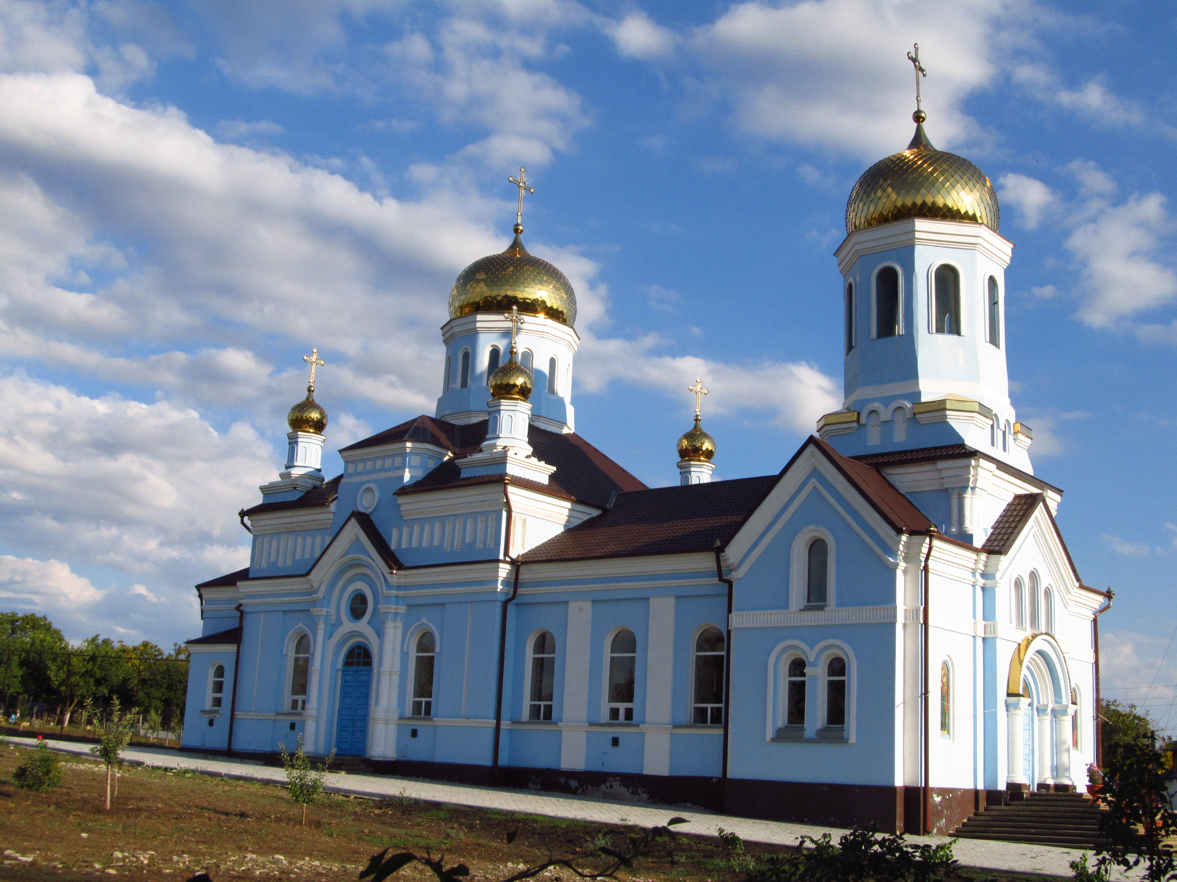 Церква, Ренійський район, с. Котловина